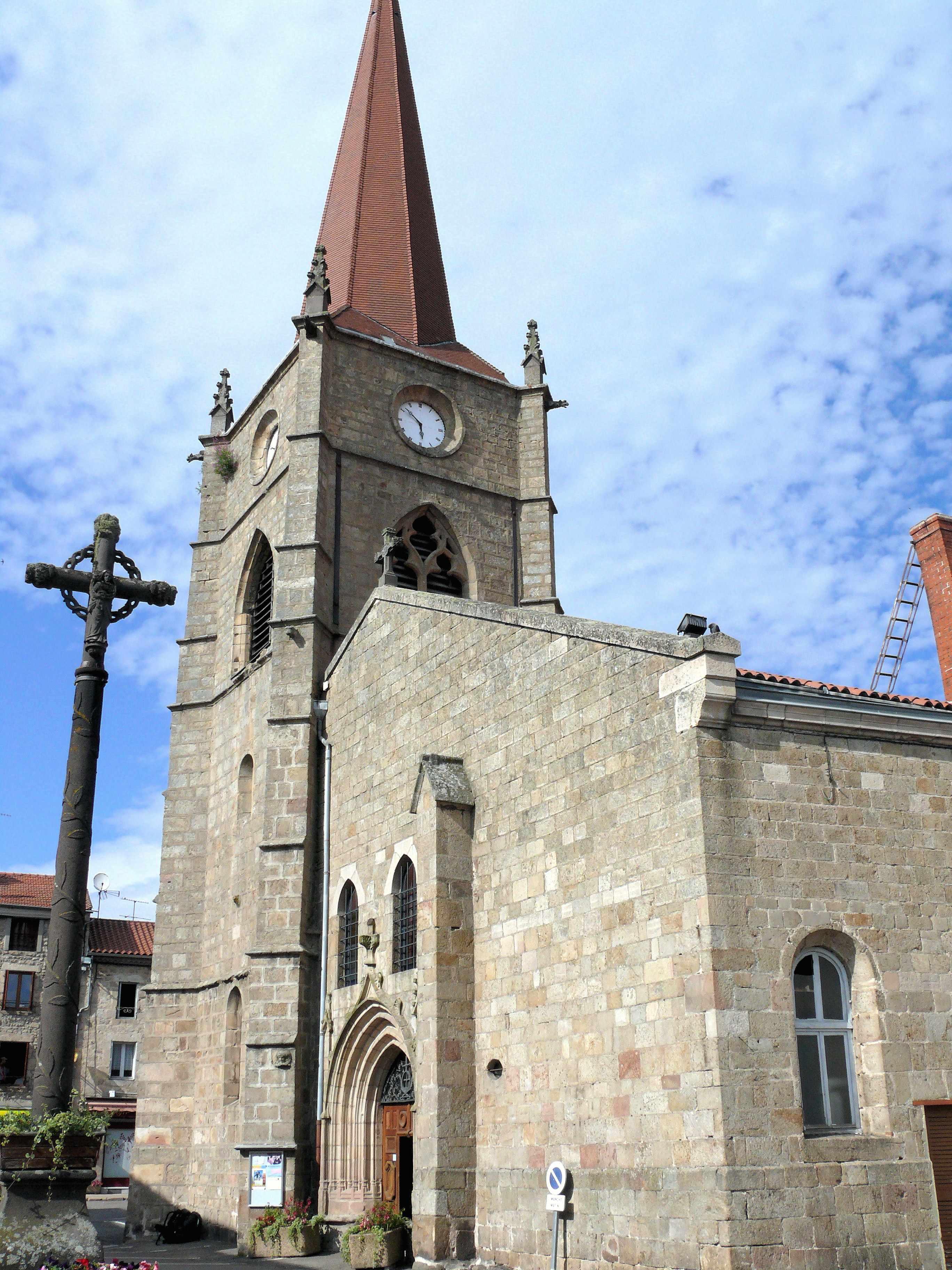 Usson-en-Forez - Eglise Saint-Symphorien et croix de mission de 1828